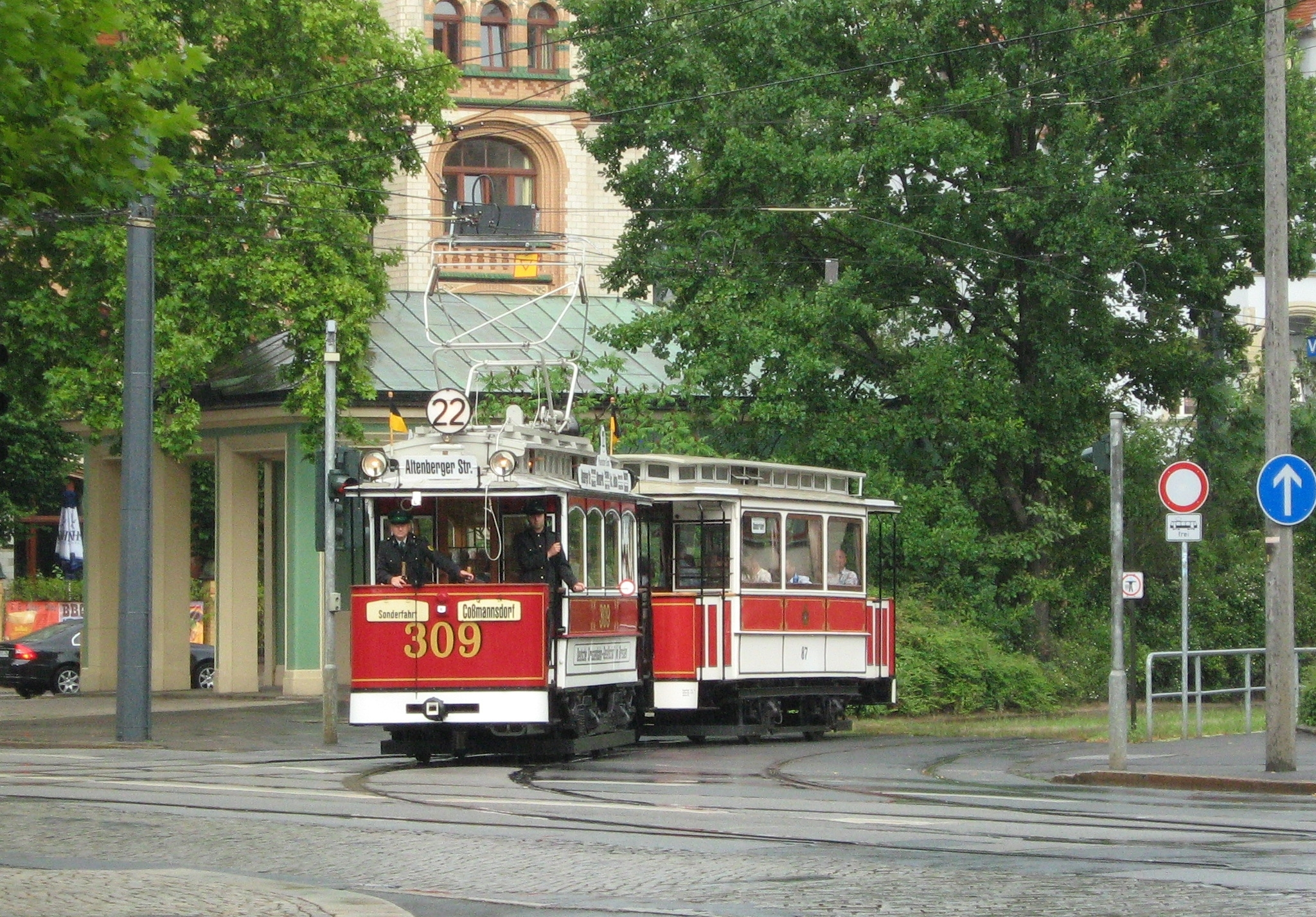 Der historische Berolina-Triebwagen Nr. 309 (Baujahr 1902) des Dresdner Straßenbahnmuseums am Fetscherplatz in Dresden